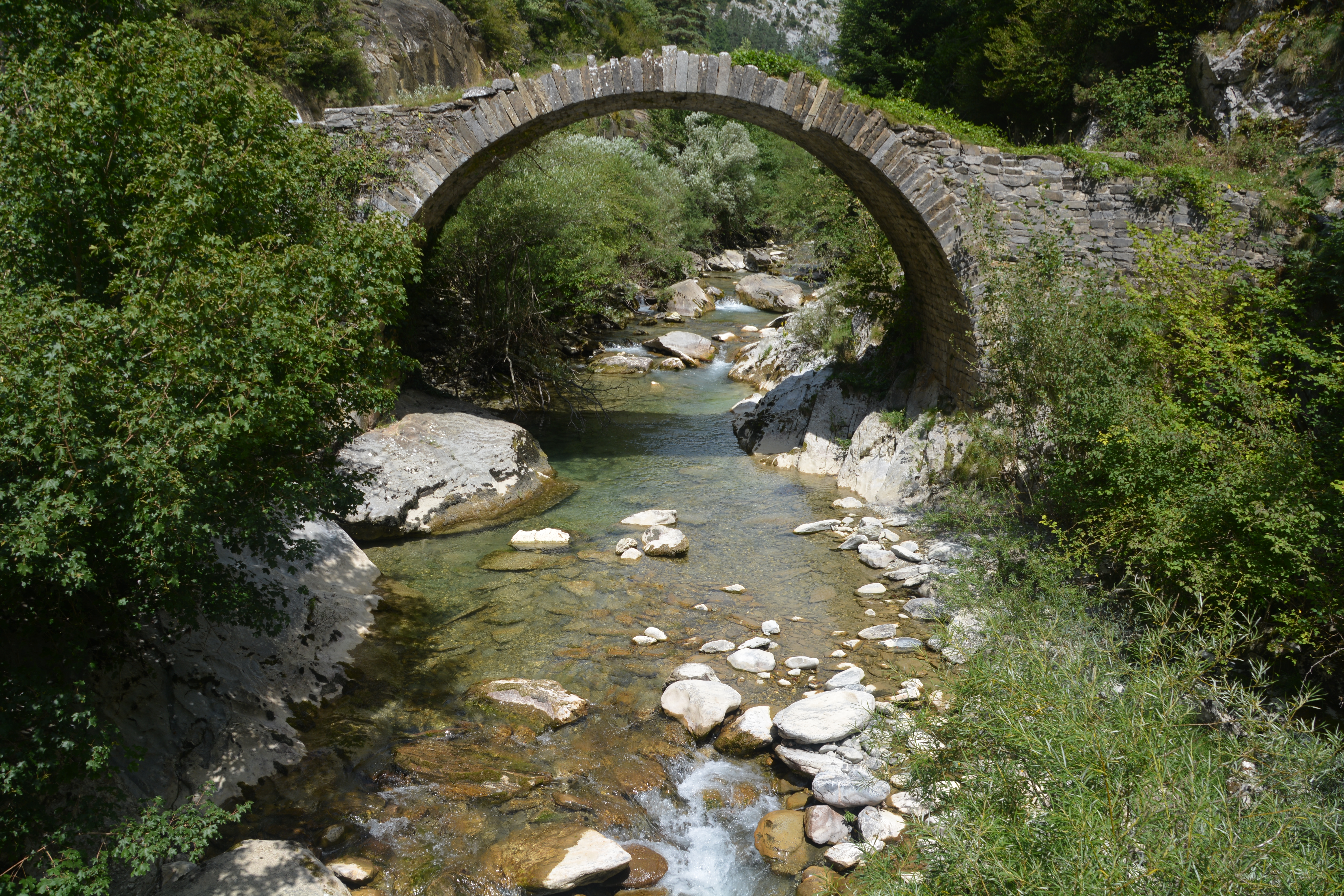 Puente llamado "romano" sobre el río Belagua, Isaba, Parque Larra-Aztaparreta, Roncal, Navarra